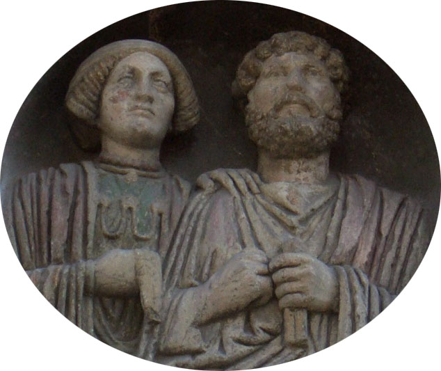 Medaillon auf einem Haus am Welser Stadtplatz, das von einem römischen Grabstein stammt